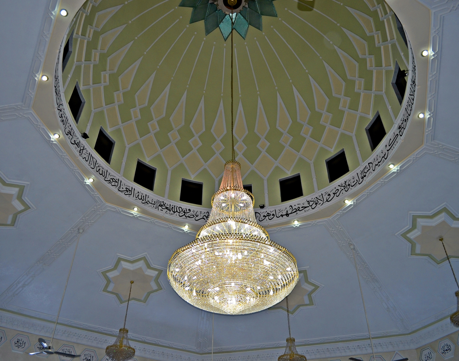 نجفة في أحد مساجد عمّان، الأردن